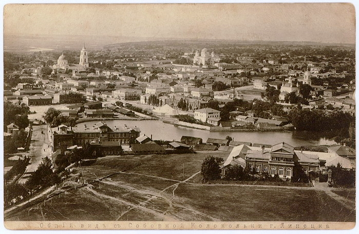 Lipeck